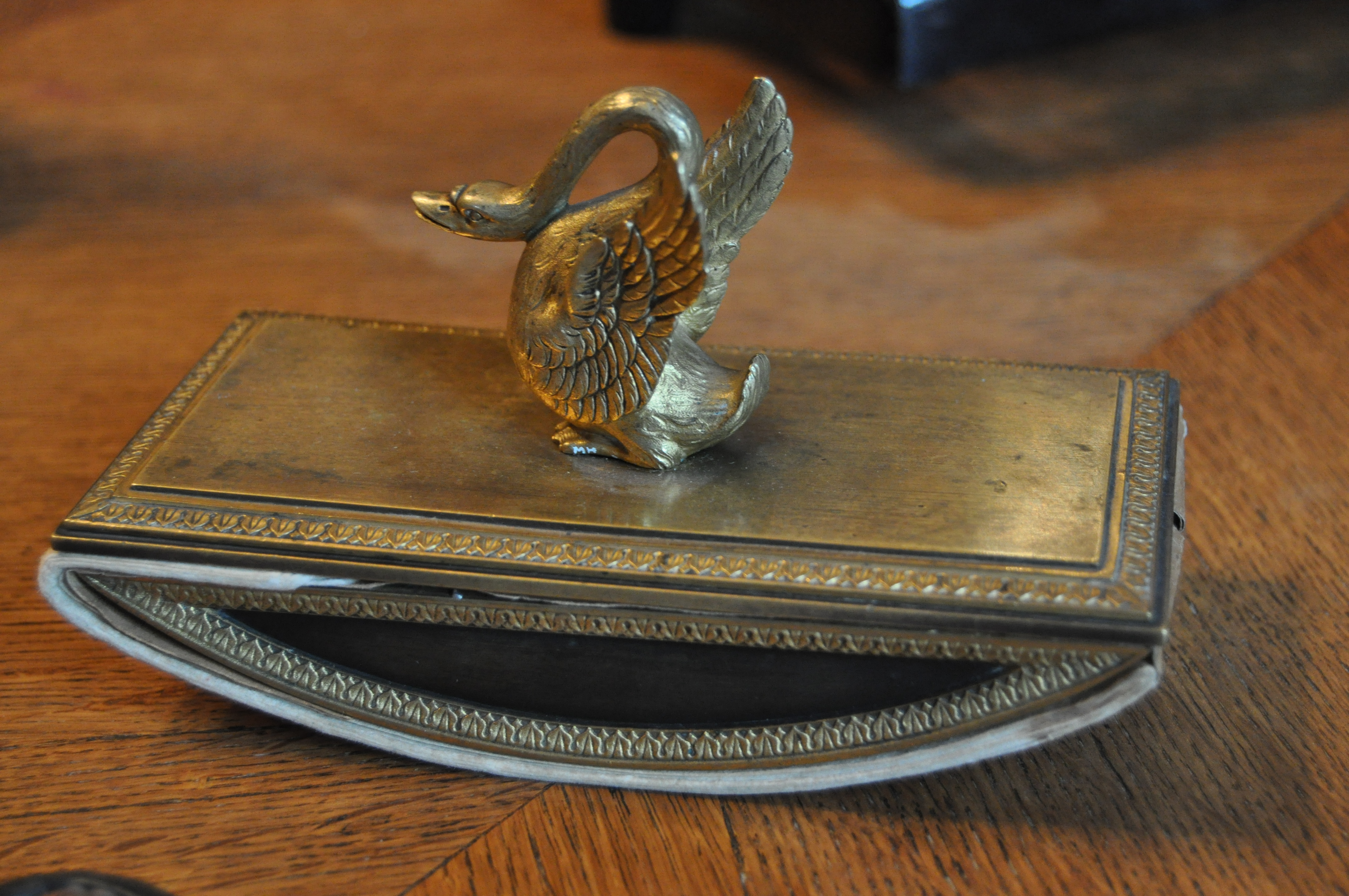 Suszka kołyskowa z biurka Rubinsteina w pałacu Izraela Poznańskiego